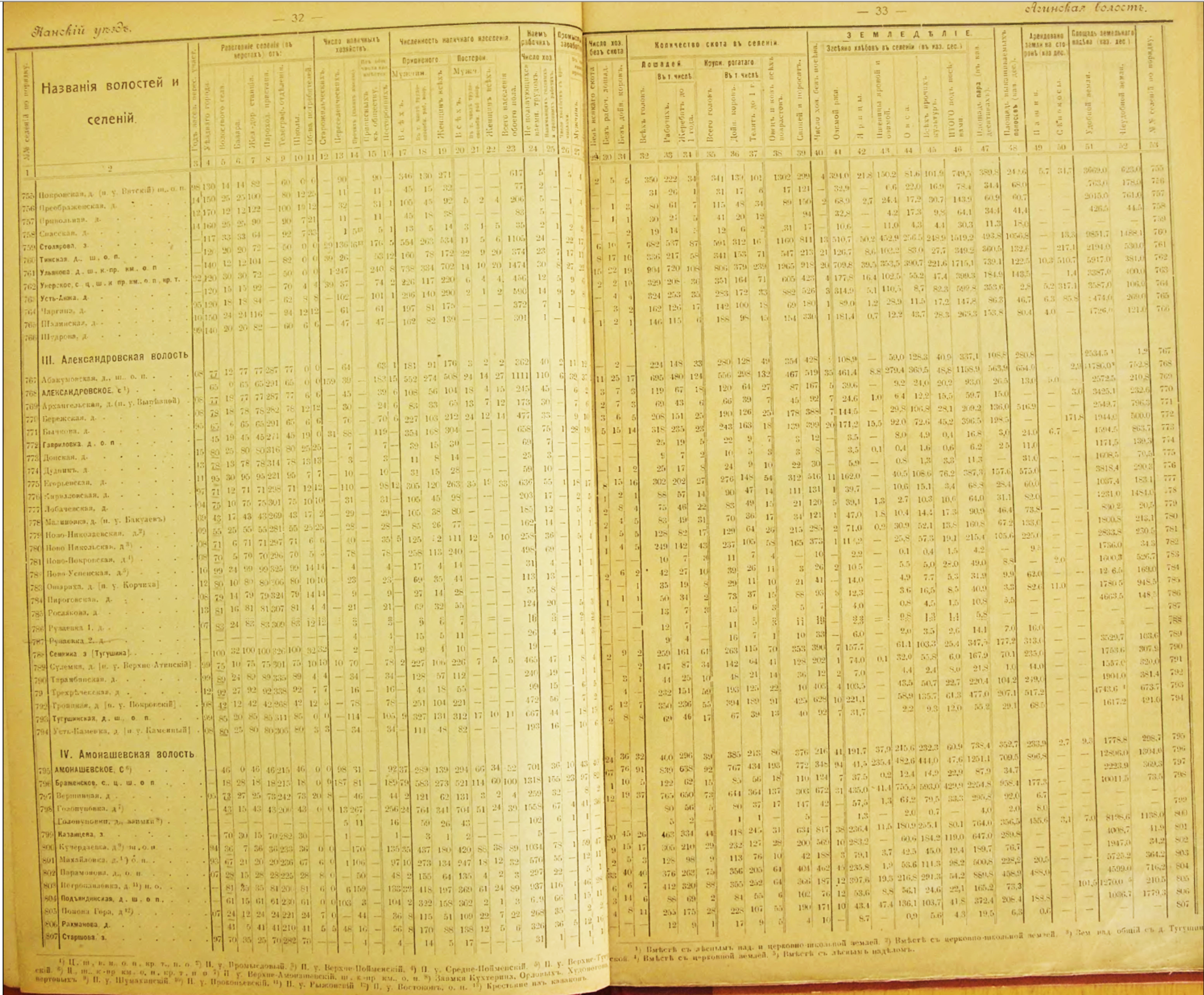 фрагмент Южно-Александровка